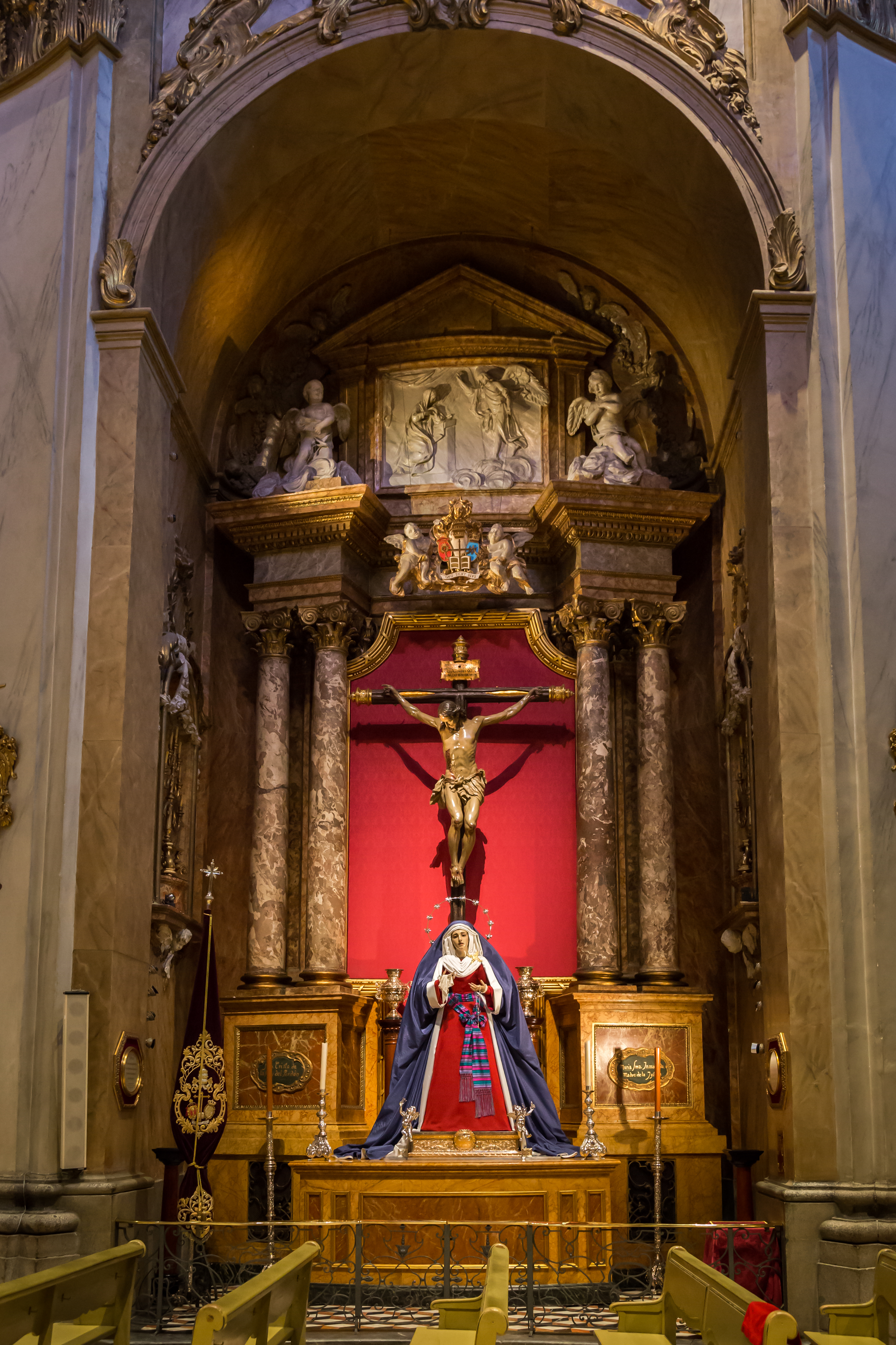 Capilla de las sagradas imágenes de la Hermandad Sacramental y Cofradía de Nazarenos de "Los estudiantes". Basílica Pontificia de San Miguel, Madrid.